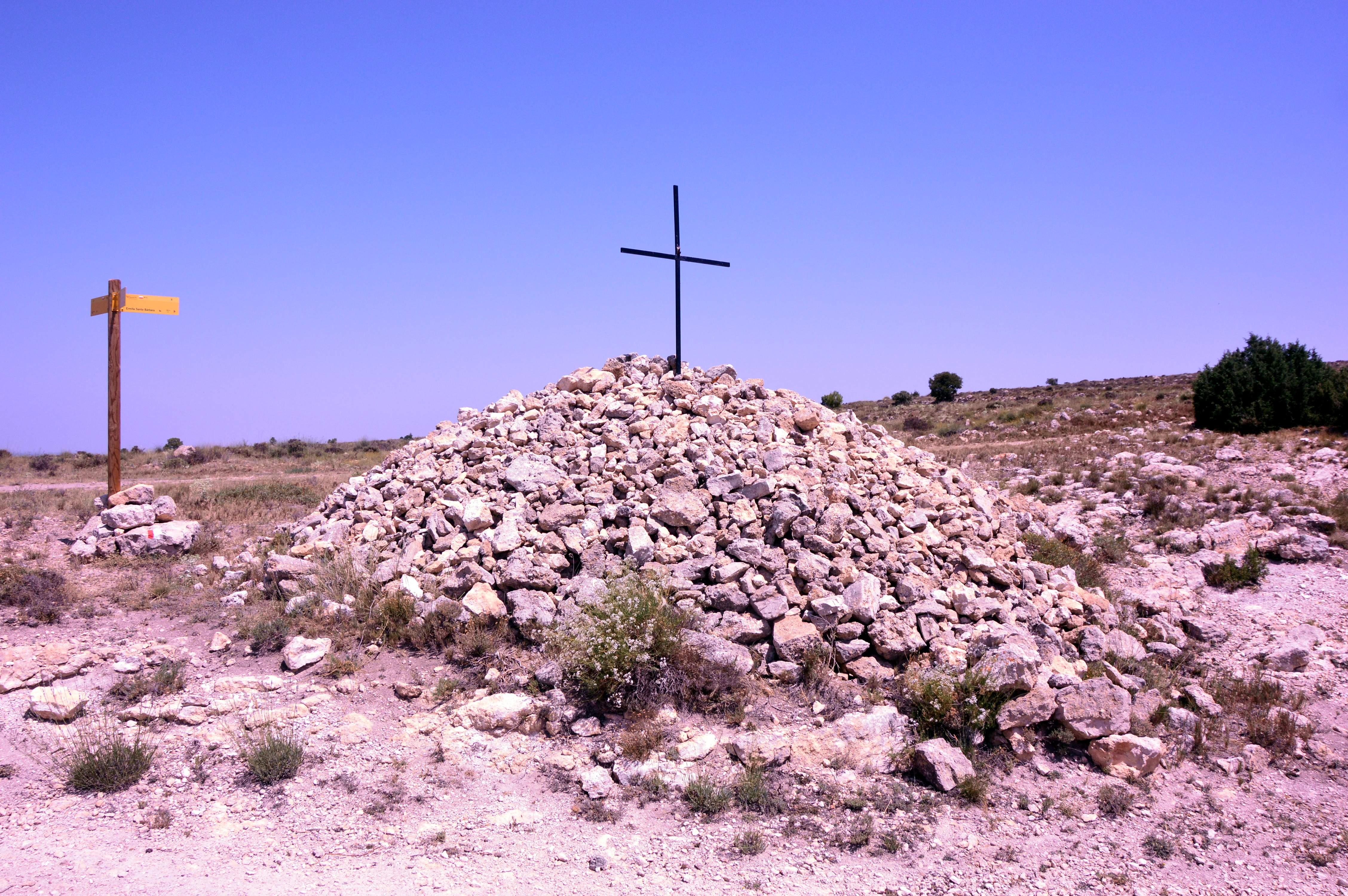 Detalle del crucero existente en el camino de la Ermita de Santa Bárbara en Riodeva (Teruel), basado en un montón de piedras con una cruz metálica en el centro (2017).